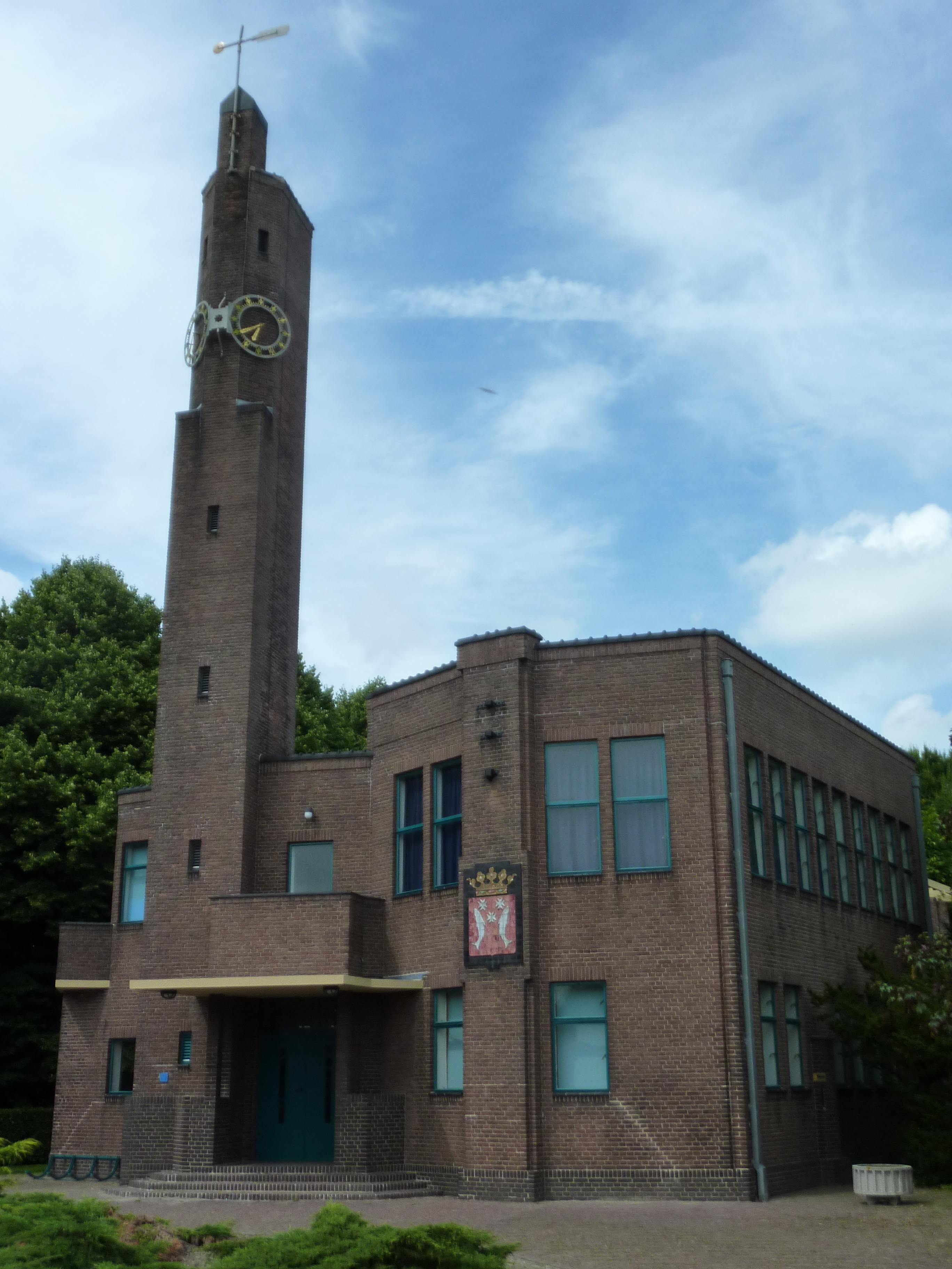 Raadhuis Usquert, H.P.Berlage, 1928-30 55″ N, 6° 36′ 32.34″ E